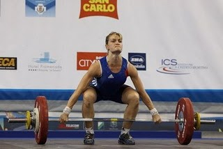 Agnès Chiquet au premier mouvement (arraché) lors des Jeux Méditerranéens 2009 d'haltérophilie